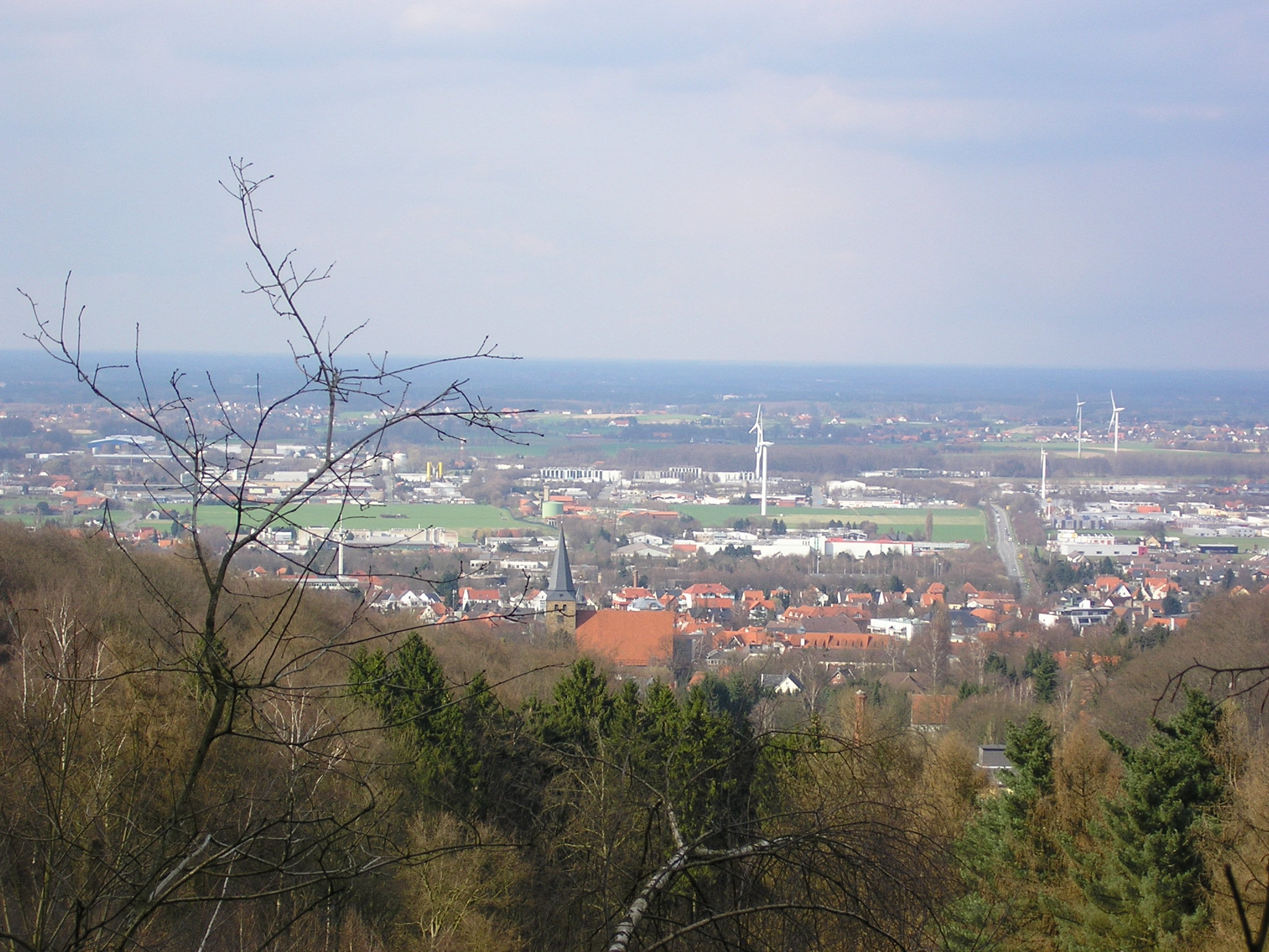 Blick auf Lübbecke